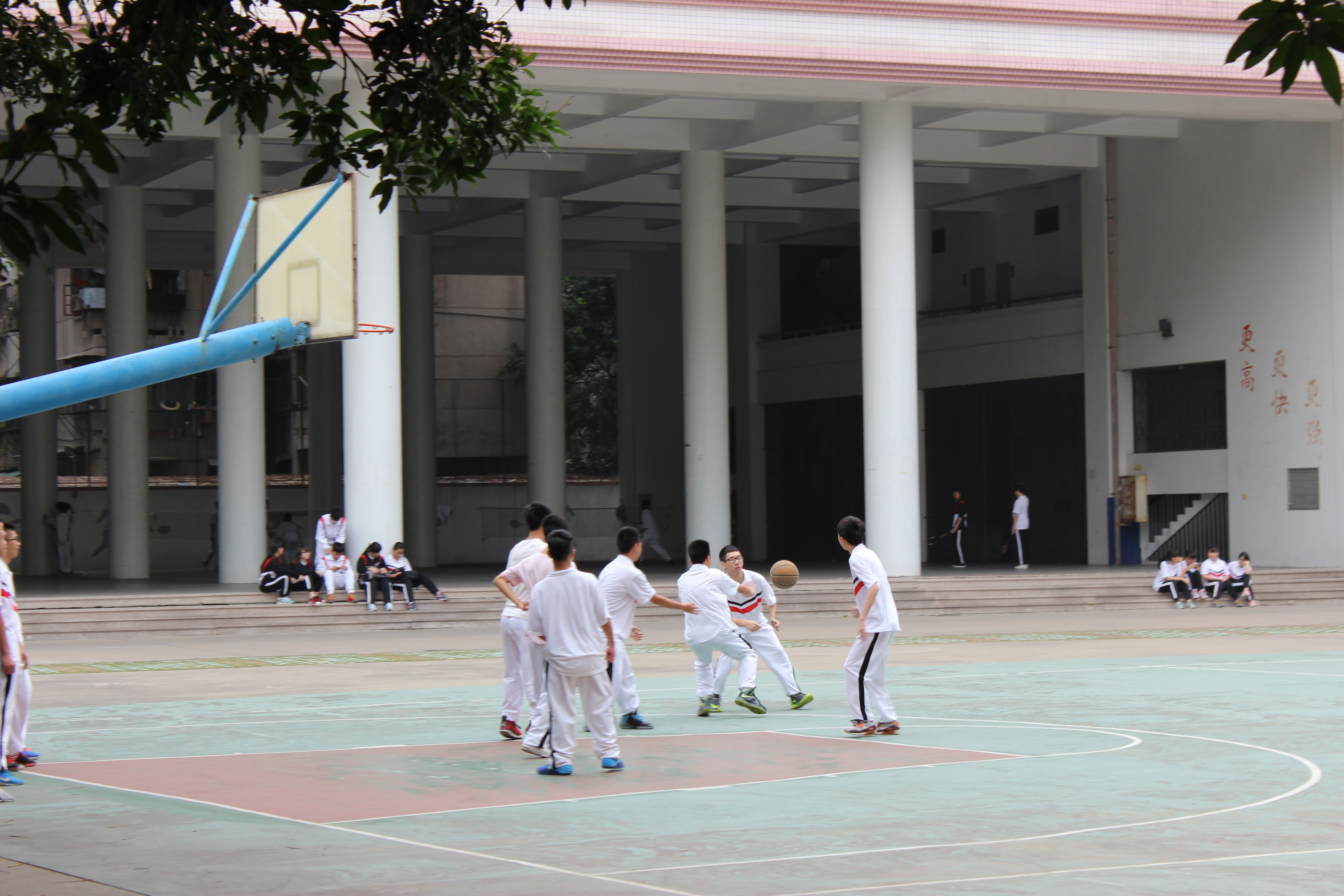 一中老校内操场